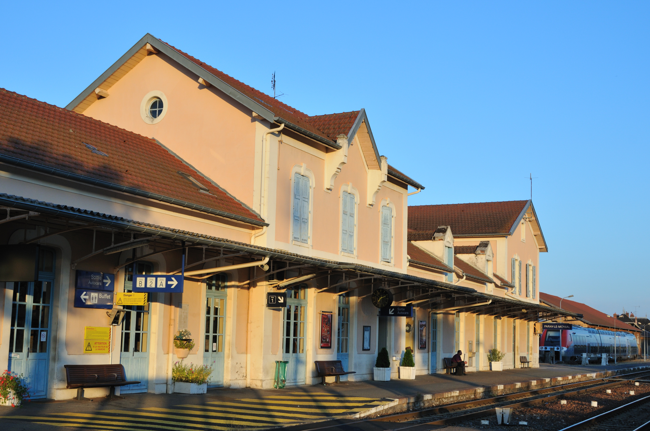 Gare de Paray-le-Monial, Saône-et-Loire, France